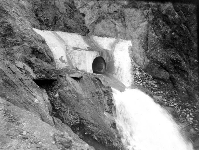 Repronegatief. De opening van tunnel 1110 west in de Keloed